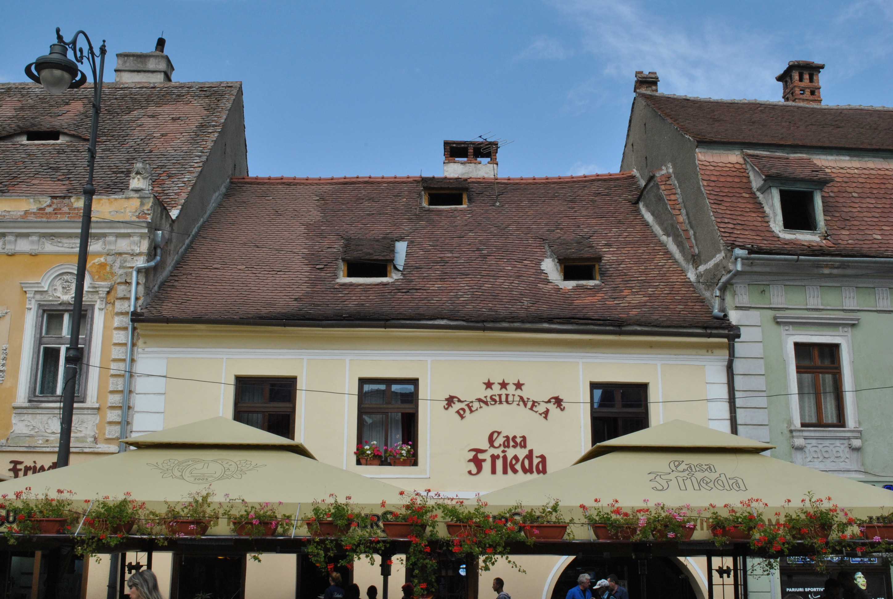 Casă, sec. XVI, sf. sec. XVII